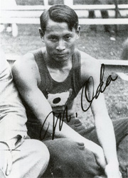 Mikio Oda